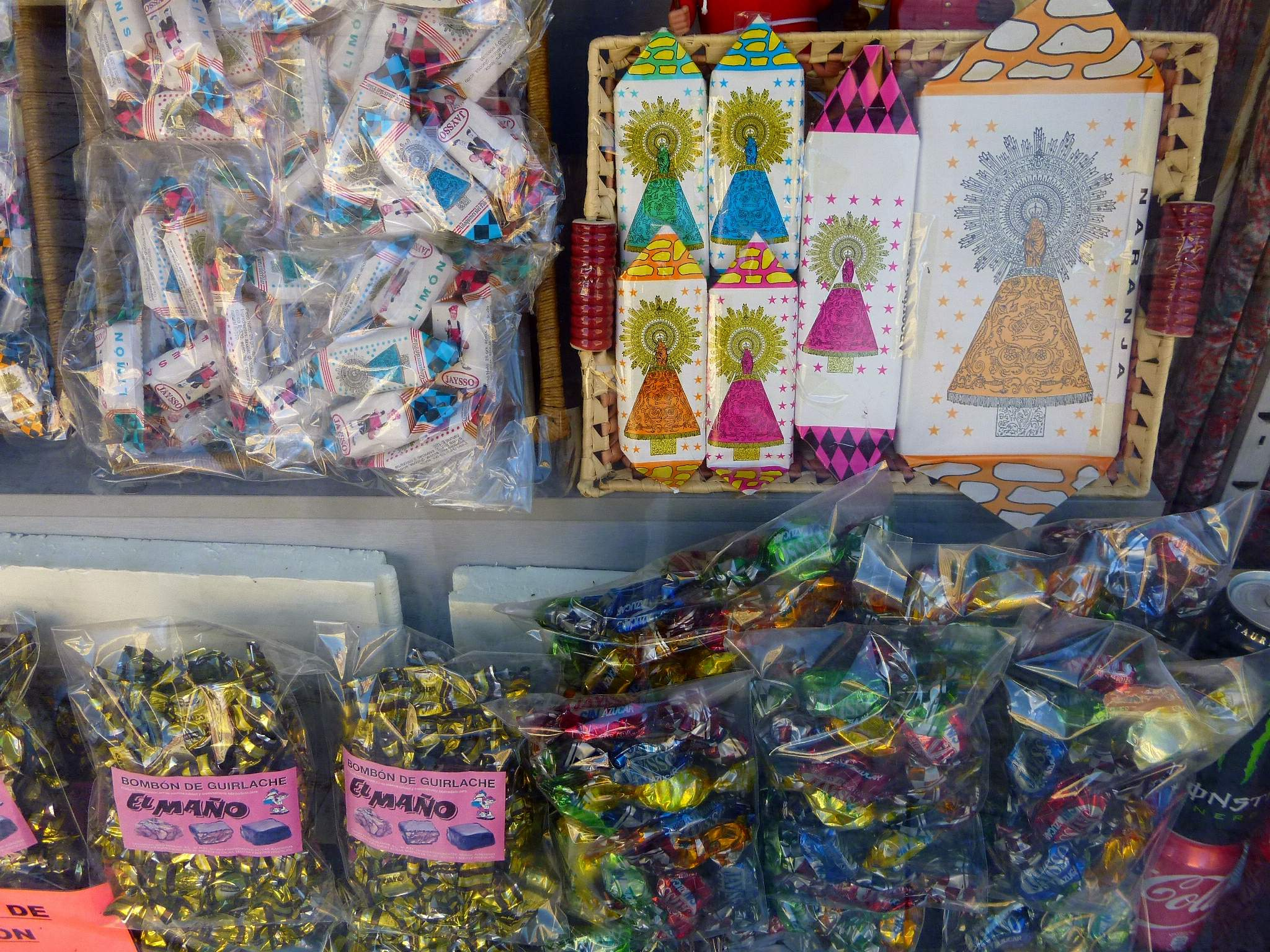 Zaragoza - Plaza del Pilar, El Maño - Adoquines del Pilar y Frutas de Aragón